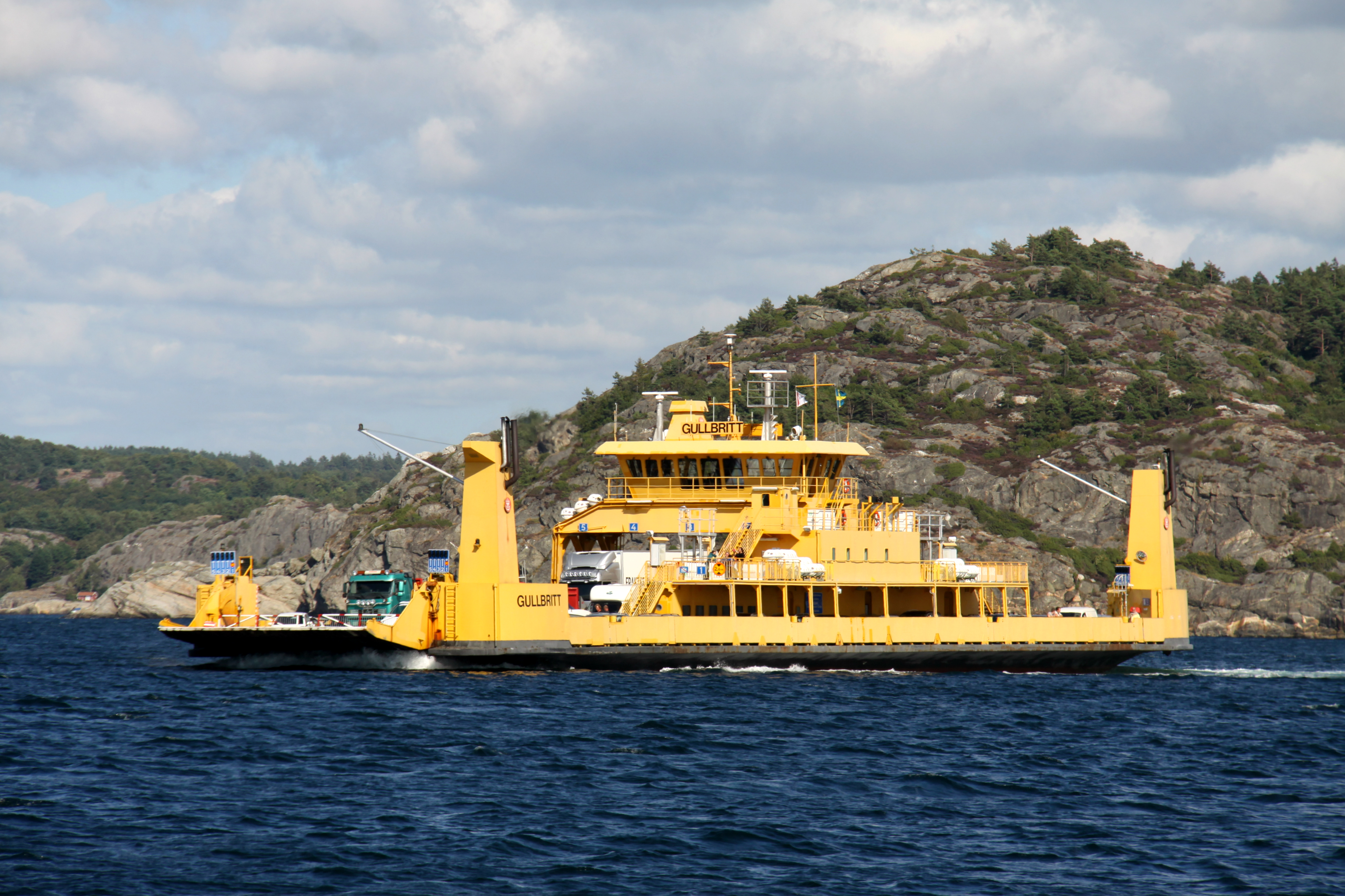 M/S Gullbritt på Gullmarsleden.